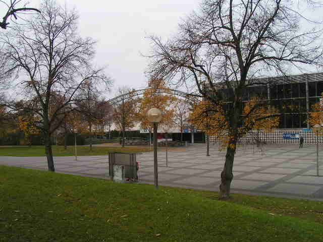 Münchner Eislaufzelt im Olympiapark